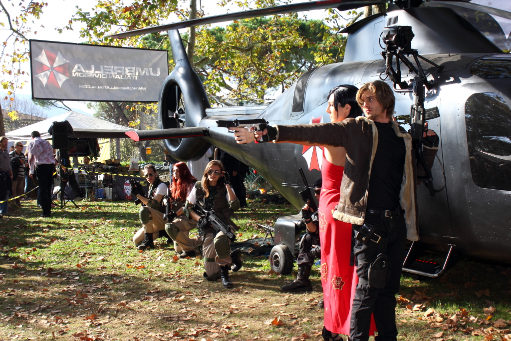 lucca_comics_13-04